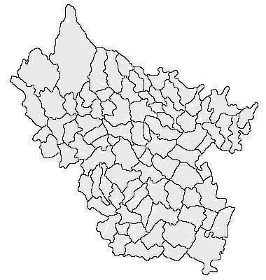 Categorie:Hărţi ale judeţului Buzău